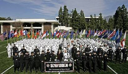 501st legion réunion